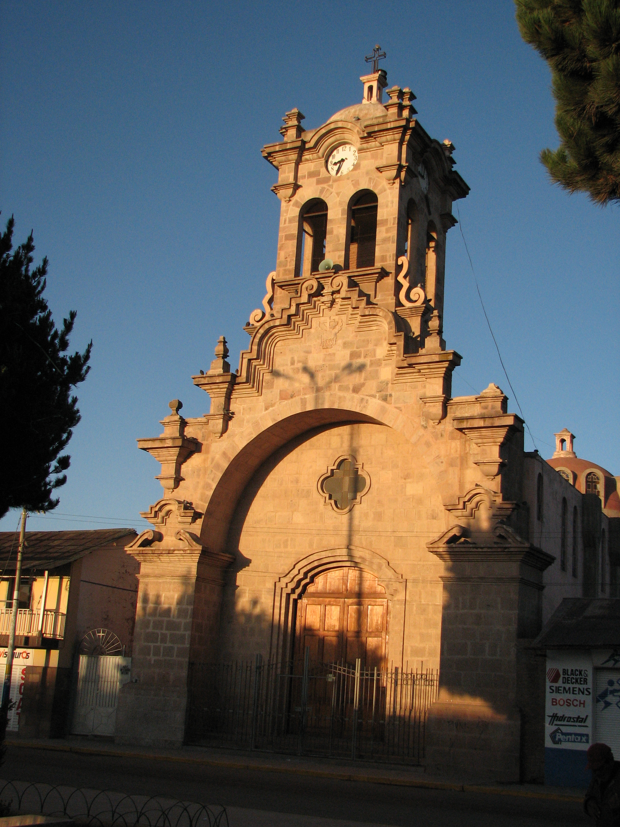 Iglesia de la Merced, Juliaca, Peru. Runa Simi: La Merced inlisya.